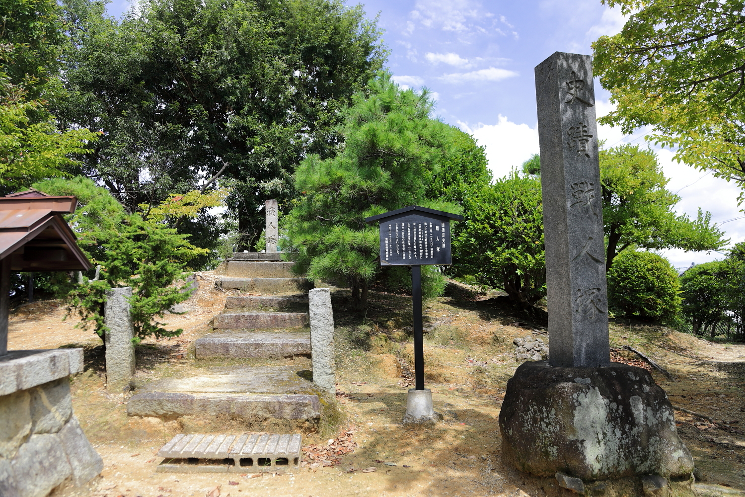 戦人塚（国指定史跡桶狭間古戦場伝説地 附）（豊明市前後町仙人塚、2018年（平成30年）8月）